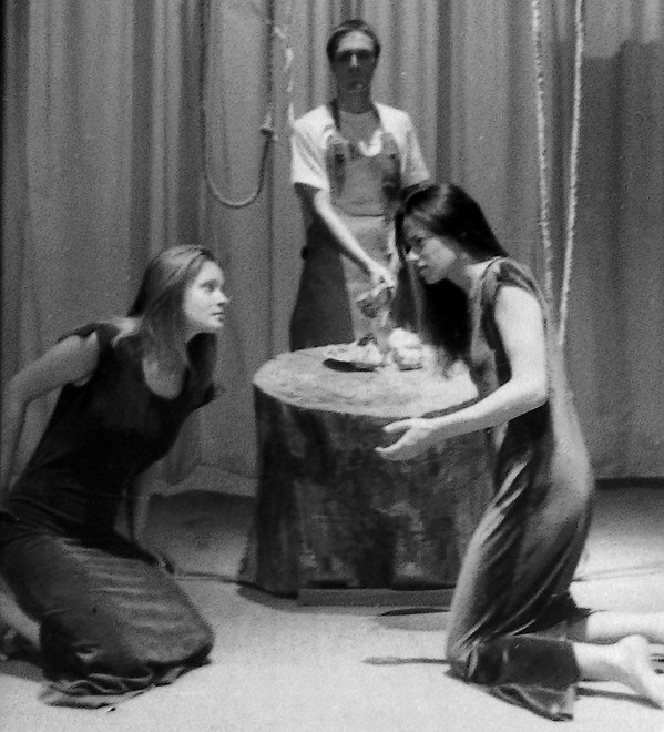 Magdalena Różczka (po prawej) na scenie nowosolskiego teatru Terminus A Quo. Spektakl "Antygona".